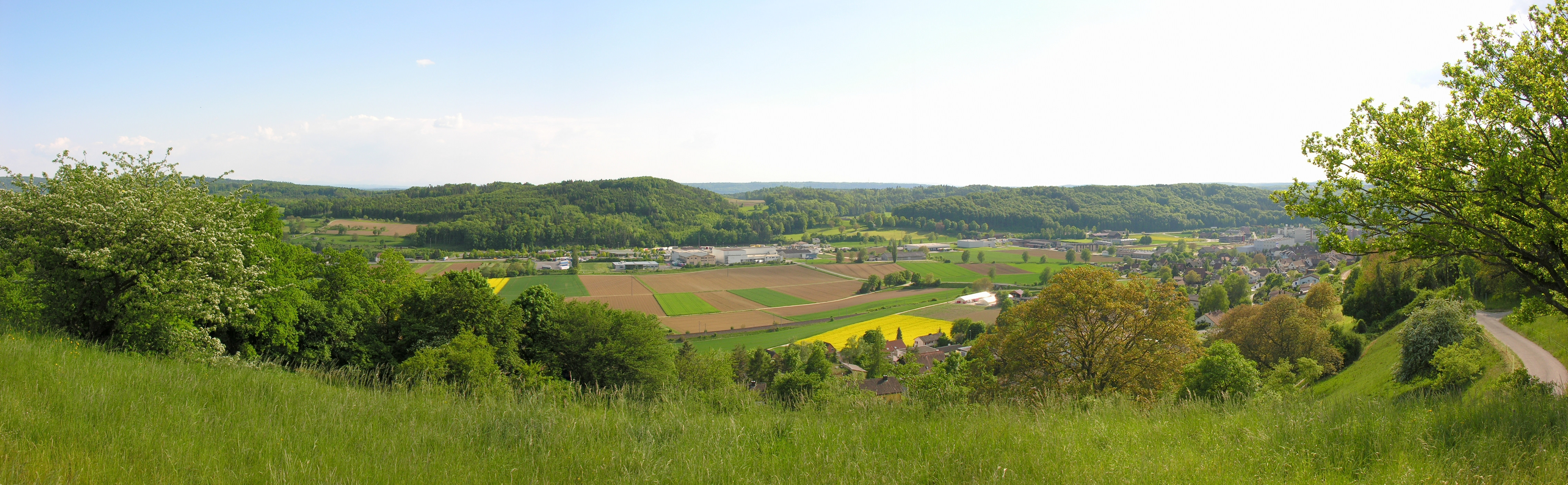 Switzerland, Schaffhausen, Chapf - Thayngen